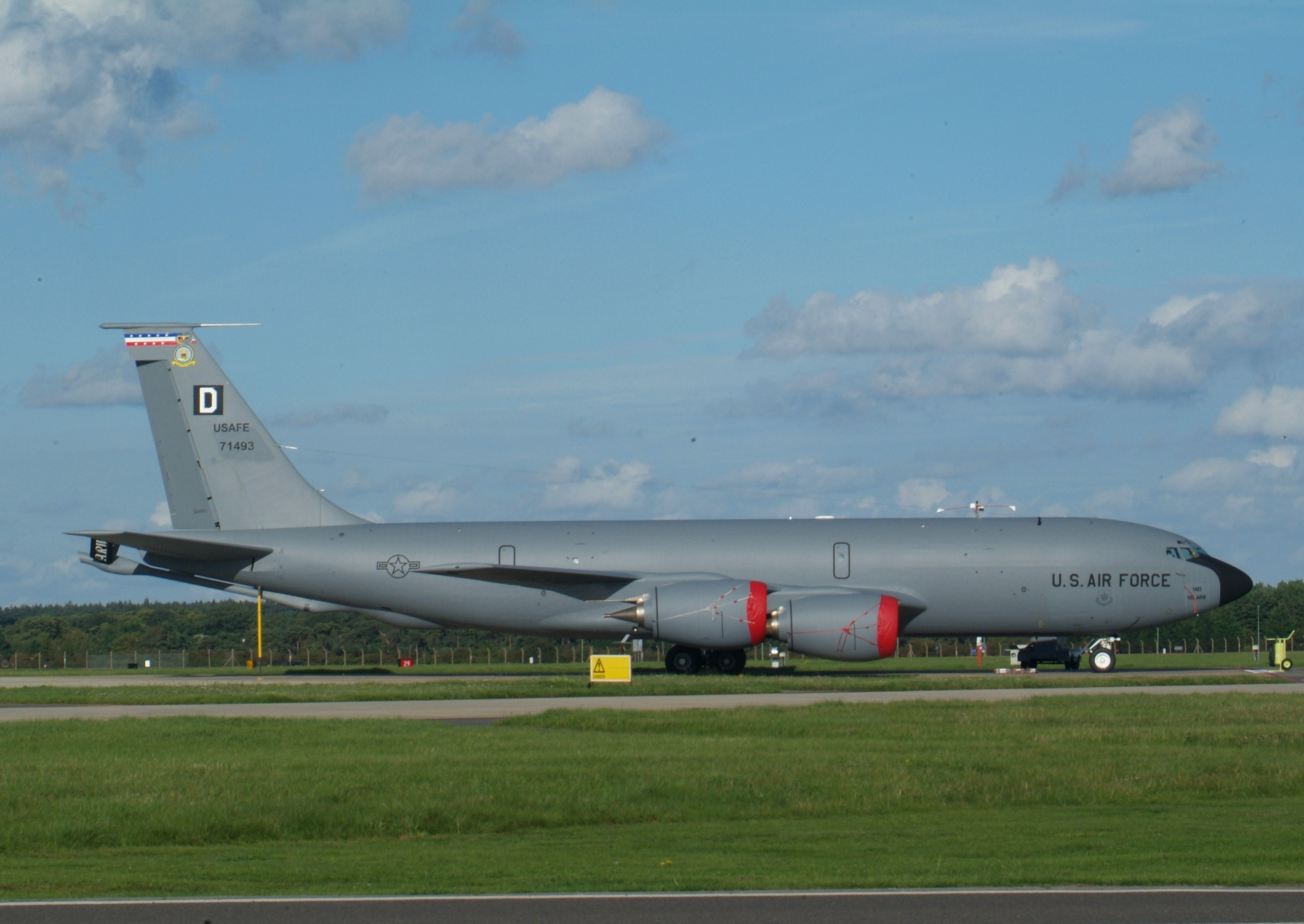 57-1493 KC-135R 100 ARW 351 ARS USAFE RAF Mildenhall